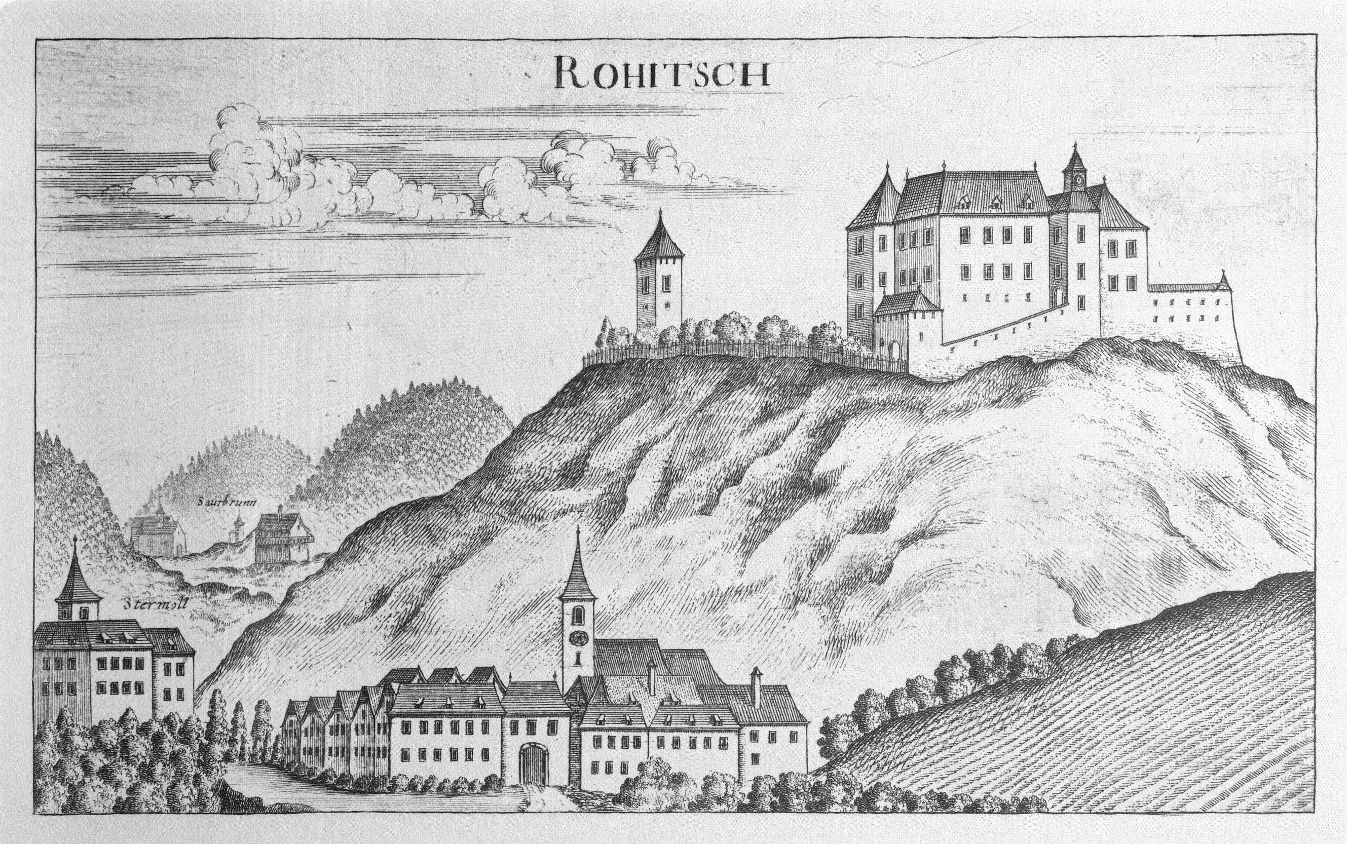 G. M. Vischers Käyserlichen Geographi, Topographia Ducatus Stiriae, Das ist: Eigentliche Delineation / und Abbildung aller Städte / Schlösser / Marcktfleck / Lustgärten / Probsteyen / Stiffter / Clöster und Kirchen / so es sich im Herzogthumb Steyrmarck befinden; Und anjetzo Umb einen billichen Preyß zu finden seynd Bey Johann Bitsch Universitäts Buchhandlern / Auff dem Juden=Platz bey der guldenen Saulen. Graz 1681 Die Nummerierung der Dateien folgt der alphabetischen Reihung der Ortsnamen und entspricht nicht dem Vischer-Register